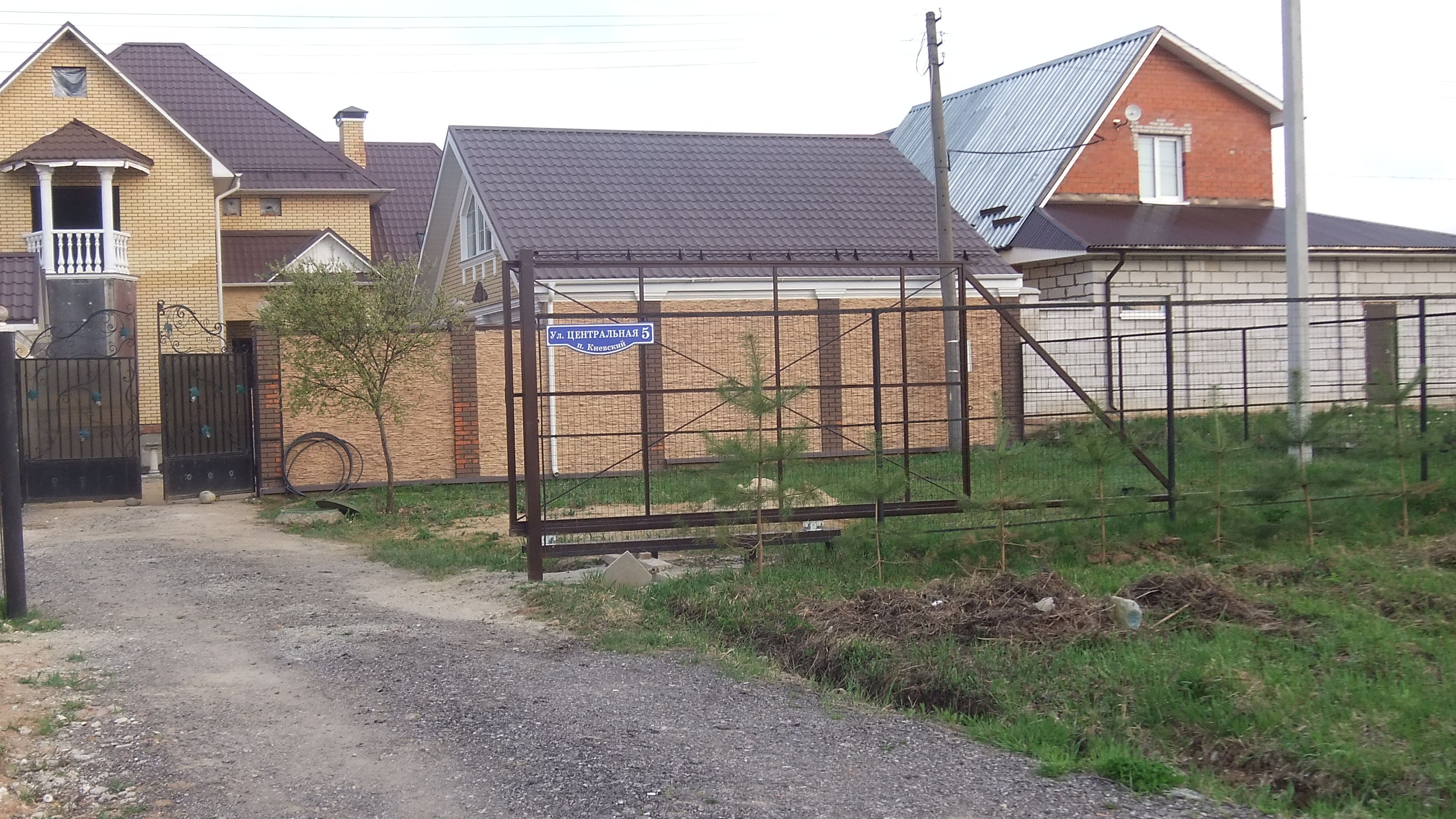 Posyolok Kievskiy. Tsentralnaya Str. 5 - sign on the road to Kievskoye shosse (M3) near Bekasovo-Sort. platform.